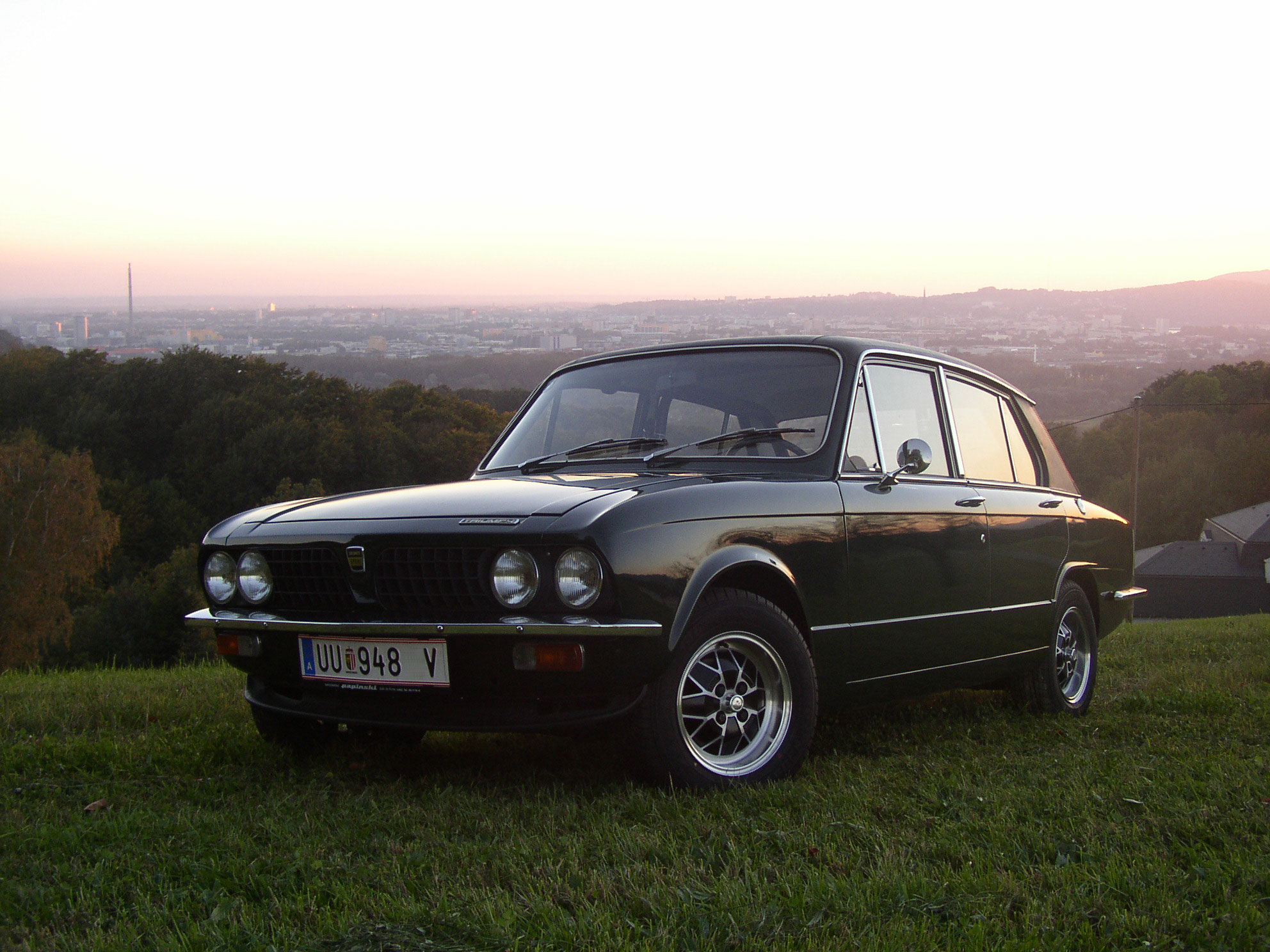 Fotografiert 10/2005 von B Kaineder